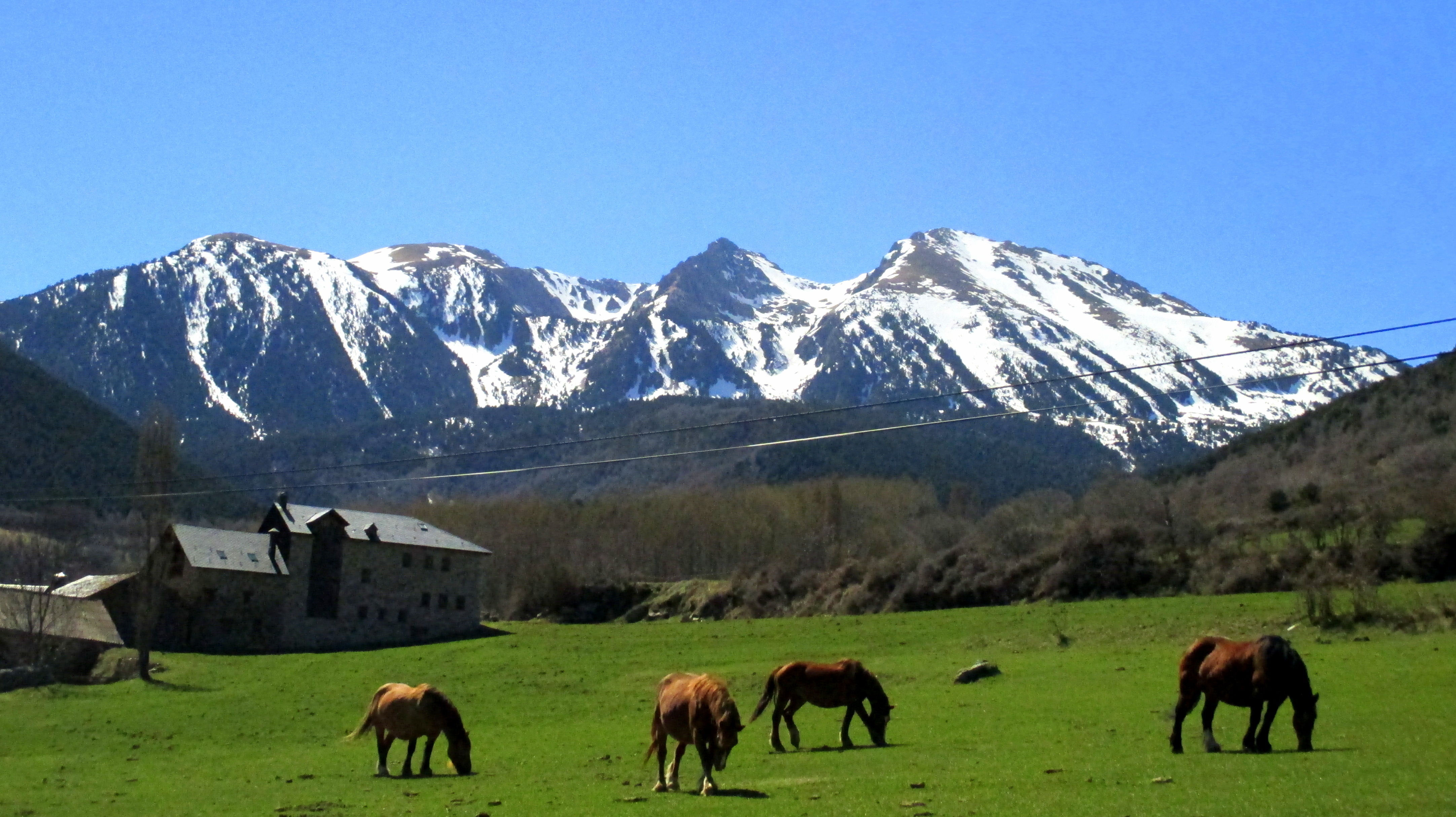 Vista de parte de Aigüestortes desde el pueblo de Son